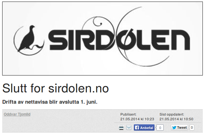 Avisa Sirdølen melder sjølv om at ho legg ned frå 01.06.2014.